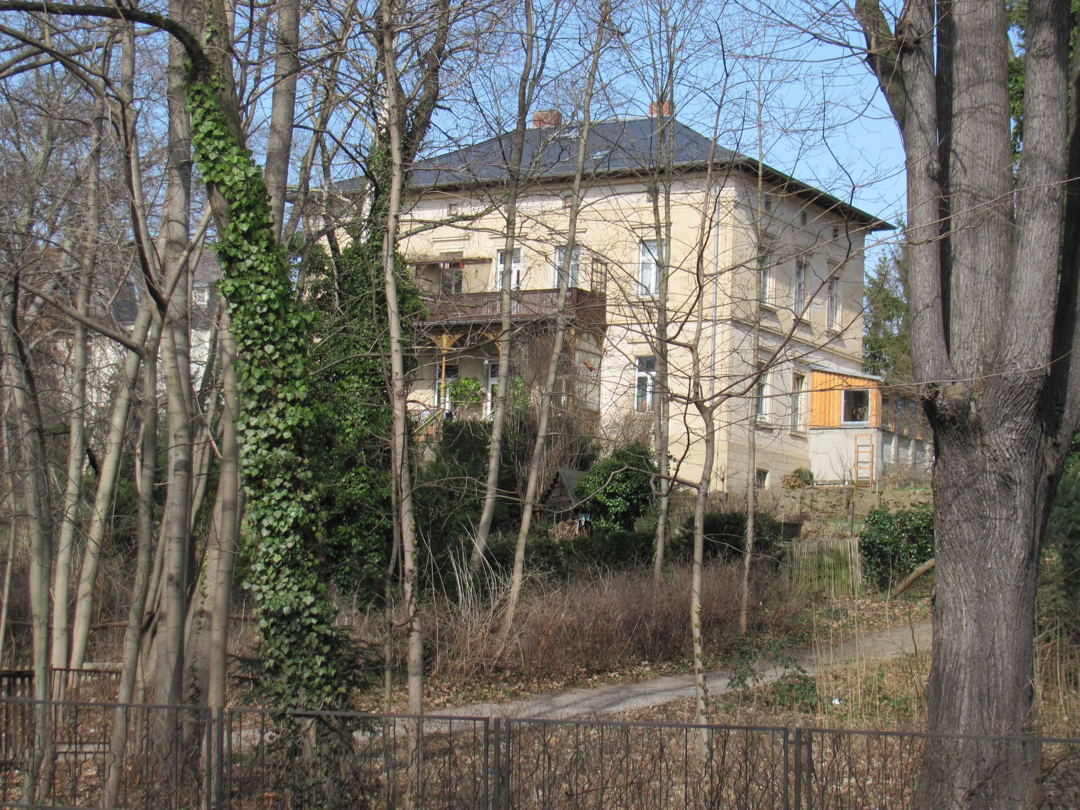 Radebeul Villa Meißner Straße 164 (Borstraße 7)